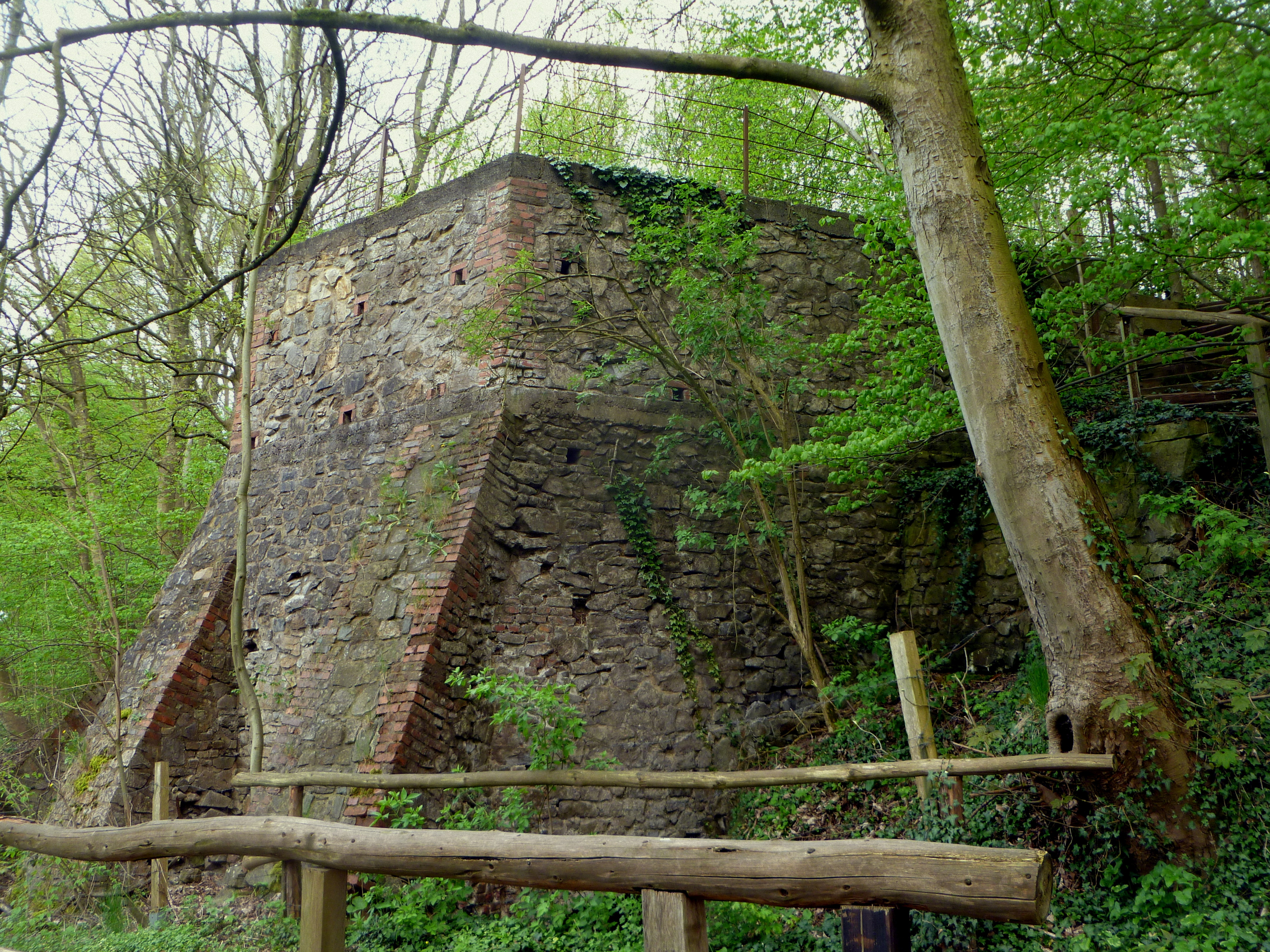 Kalkofen Bilstermühle im NSG Kornelimünster